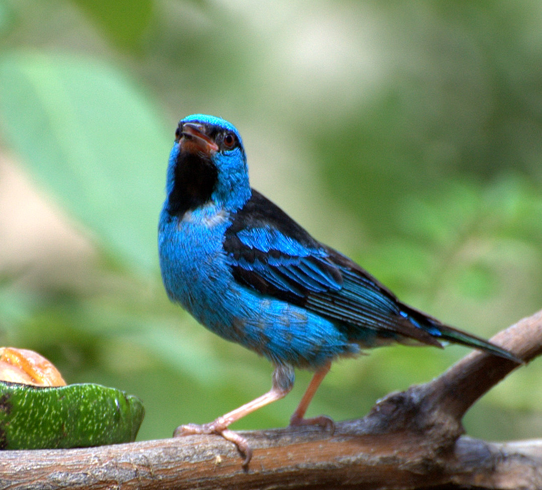 No quintal da casa dos meus pais na cidade de Piraju-SP